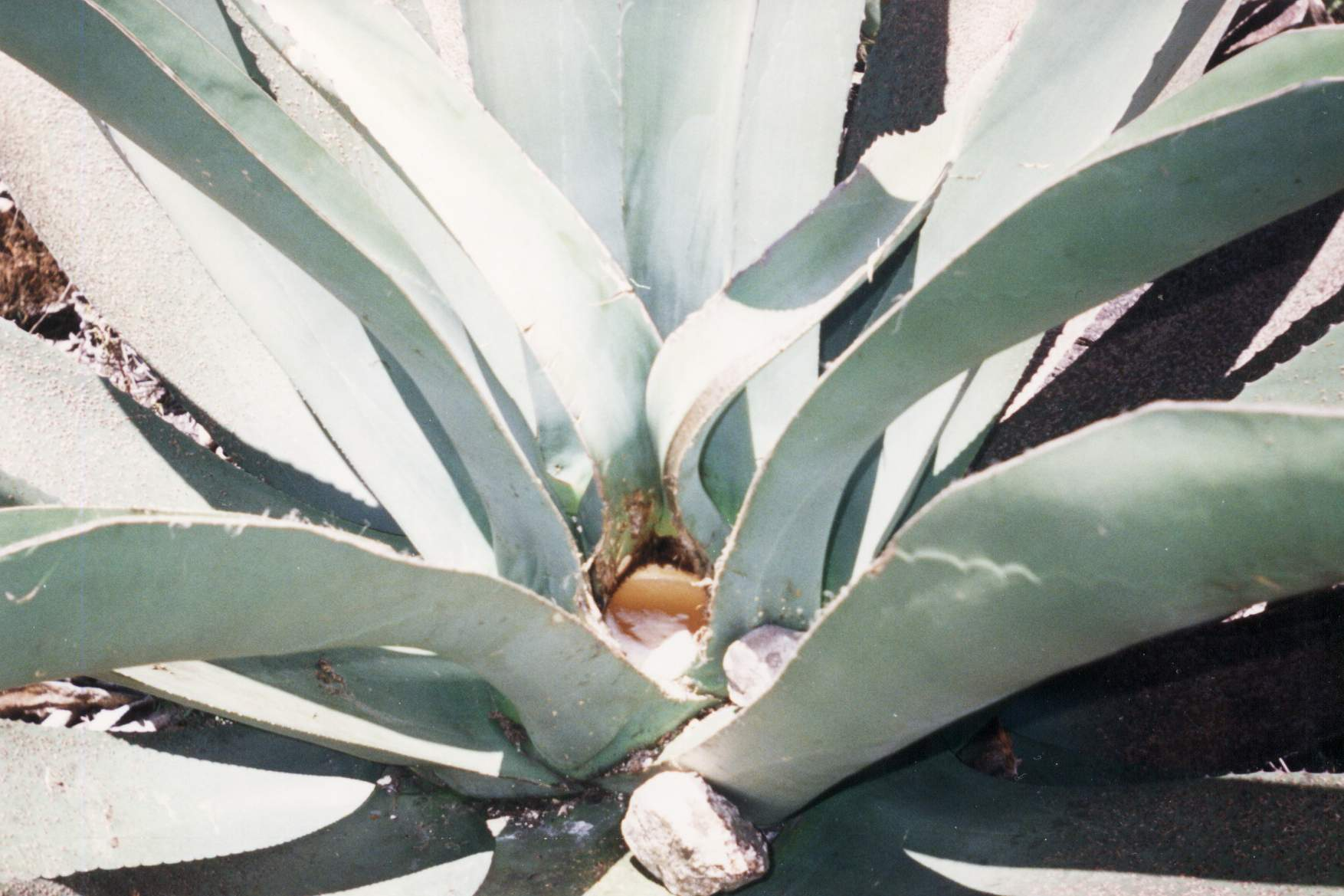 Aguamiel en un maguey lista para ser extraída. (Honeywater ready for extraction from an agave)